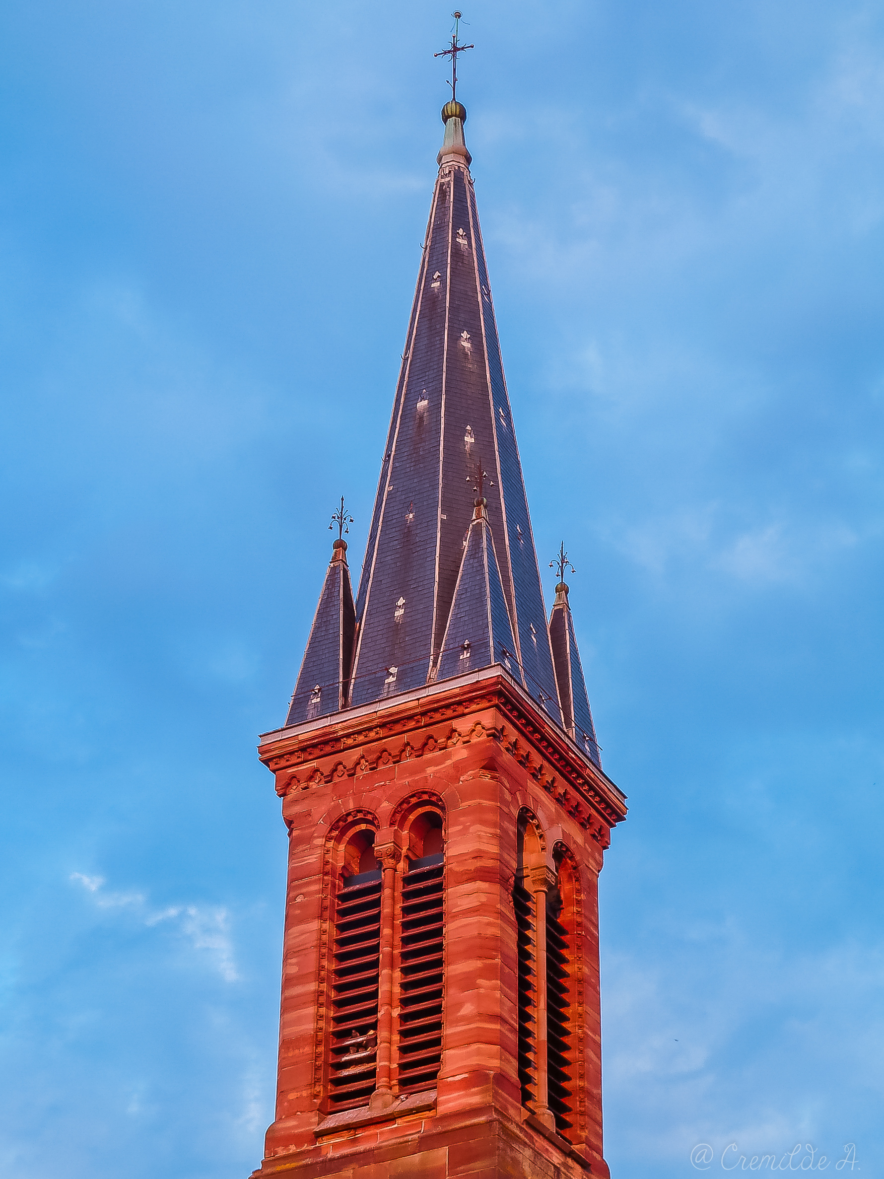 Église Saint-Maur, rue de Viller à Lunéville